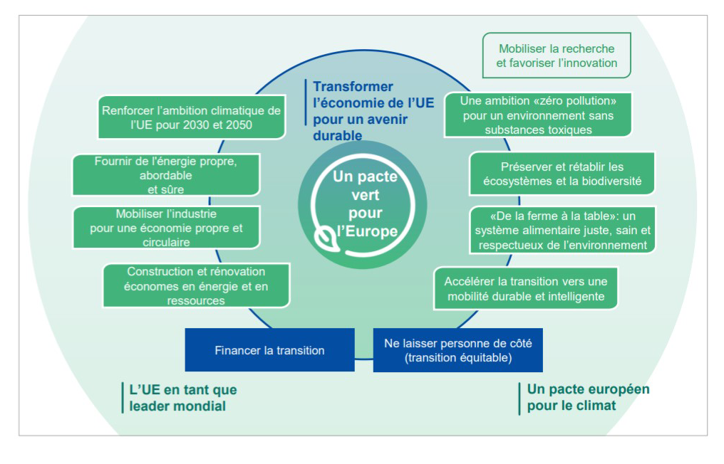 Schéma de présentation du pacte vert